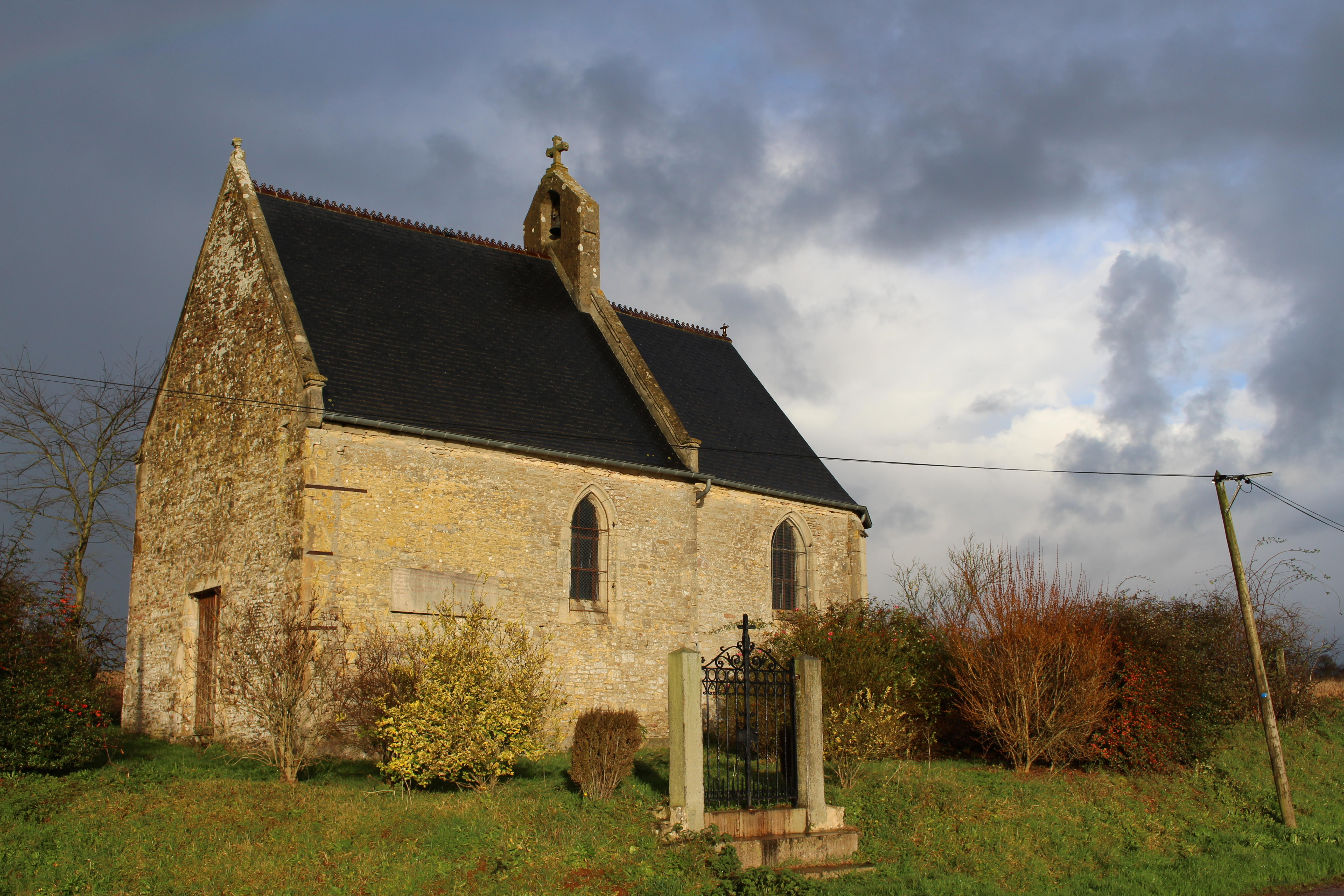 Neuilly-la-Forêt, Calvados